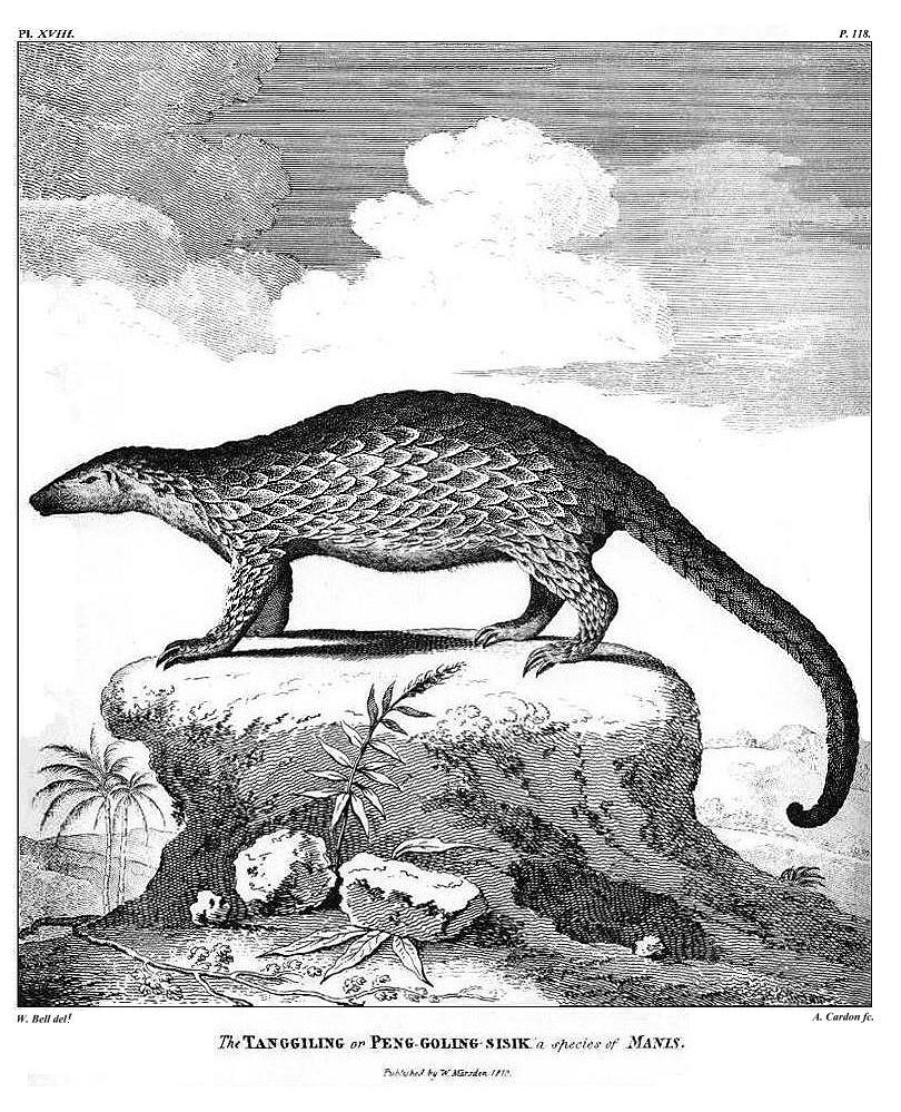 William Marsden: The History of Sumatra. Tafel XVIII: The Tanggiling